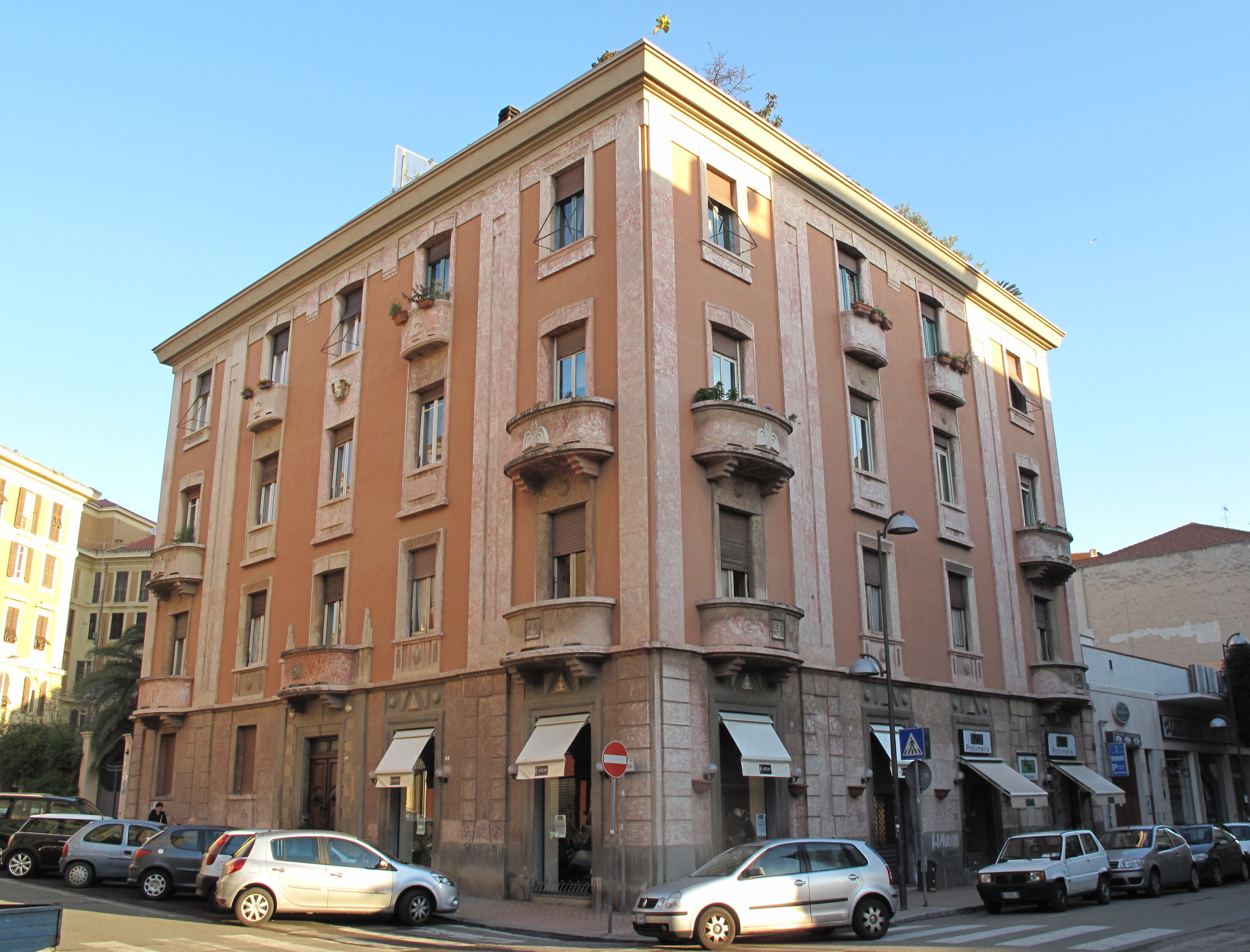 Immagine della Palazzina Lixi Contini in Cagliari.